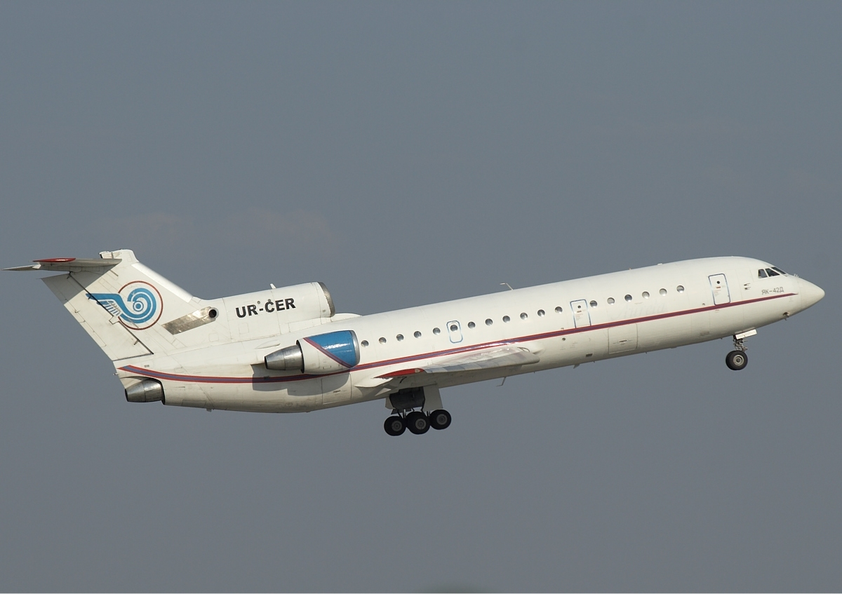 Tavria Yakovlev Yak-42D